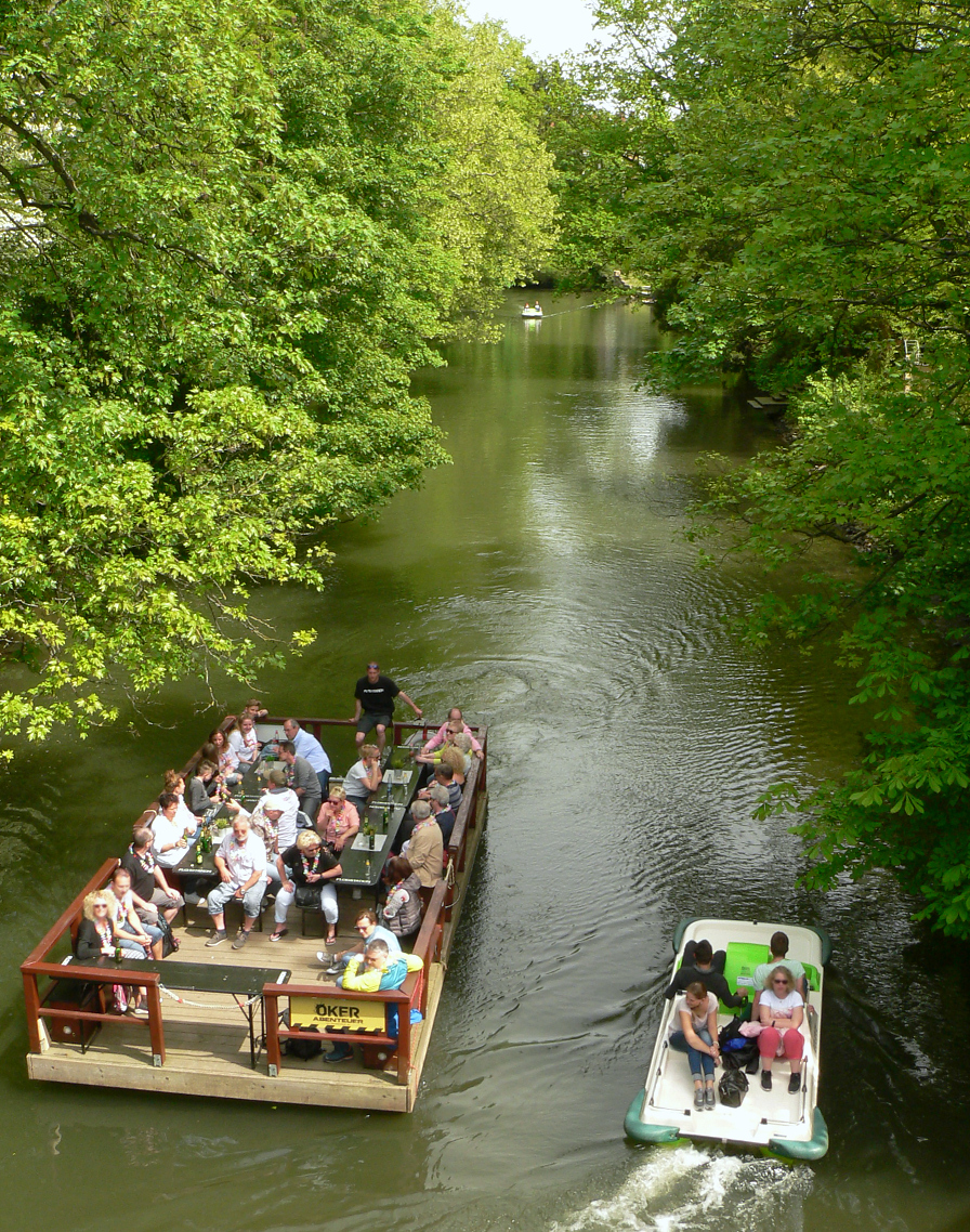 Okerfahrt in Braunschweig